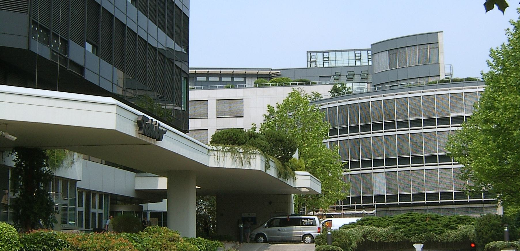 Die Hauptverwaltung der Tchibo Holding AG im Überseering 18 in Winterhude wurde 1975 bis 1977 vom Architekturbüro Burckhardt & Partner aus Basel erbaut.